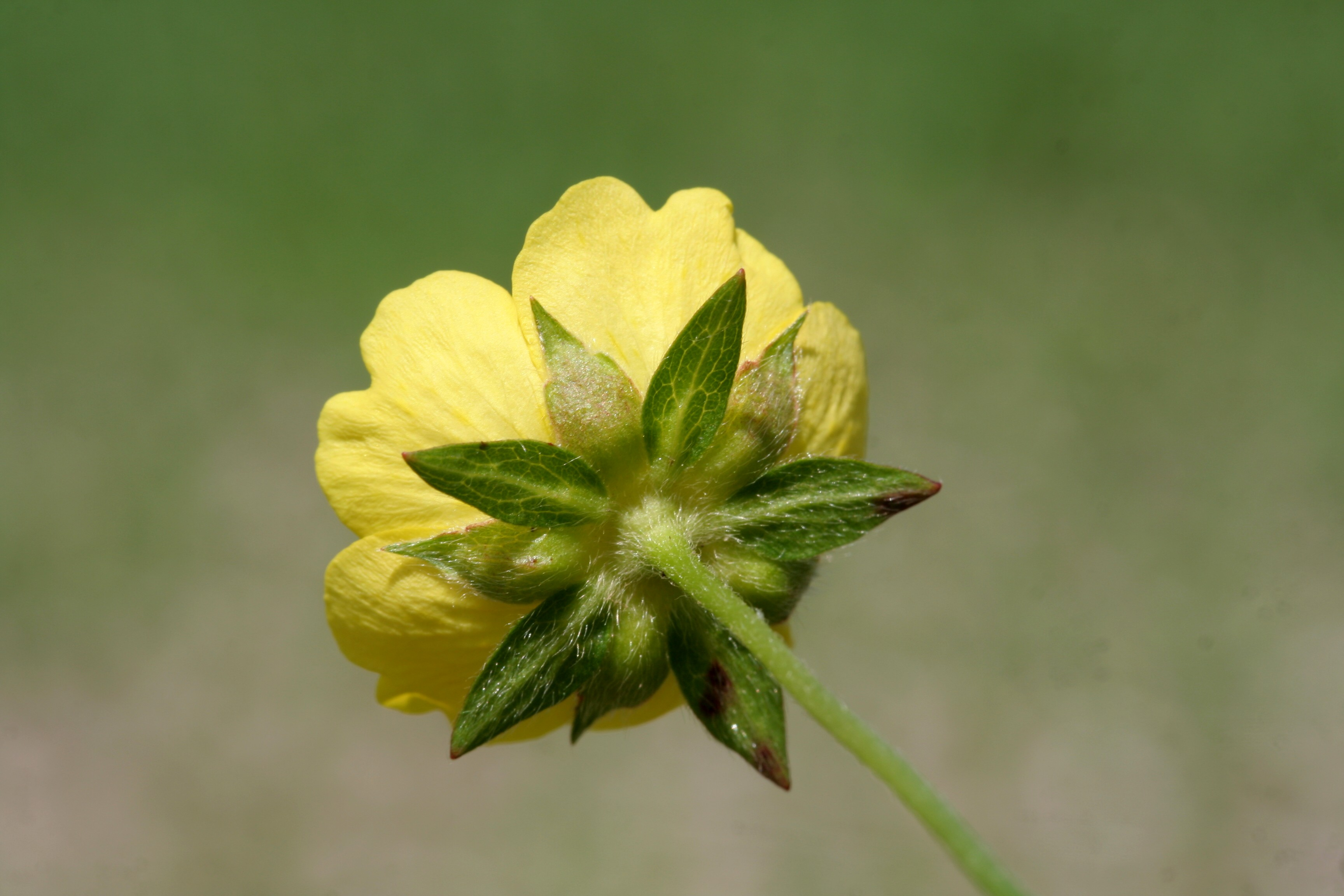 Potentilla_reptans (Cinquefoglia comune) Località Praloran, Limana (BL), quota 319 m s.l.m.